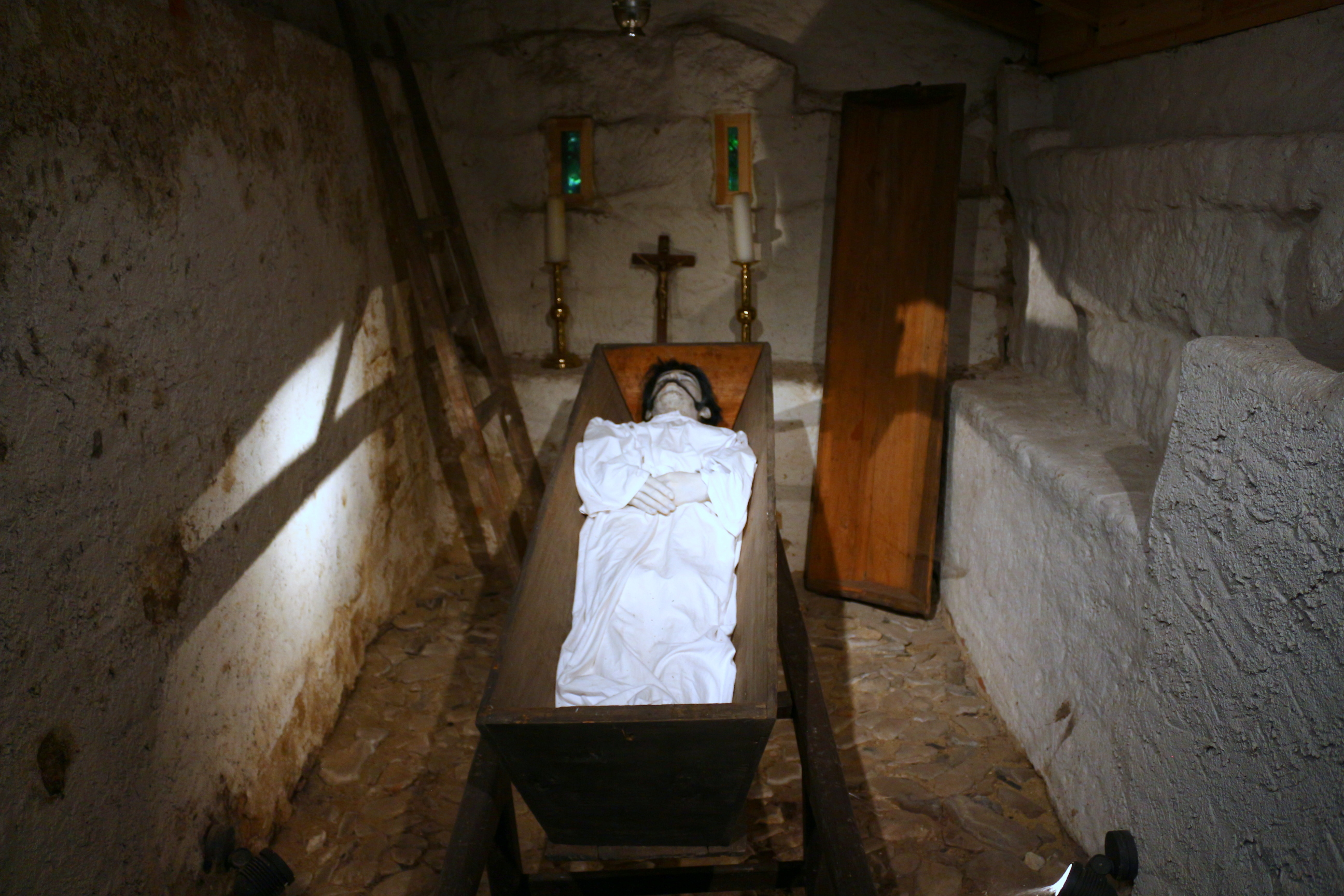 Expozice Městského muzea Mimoň